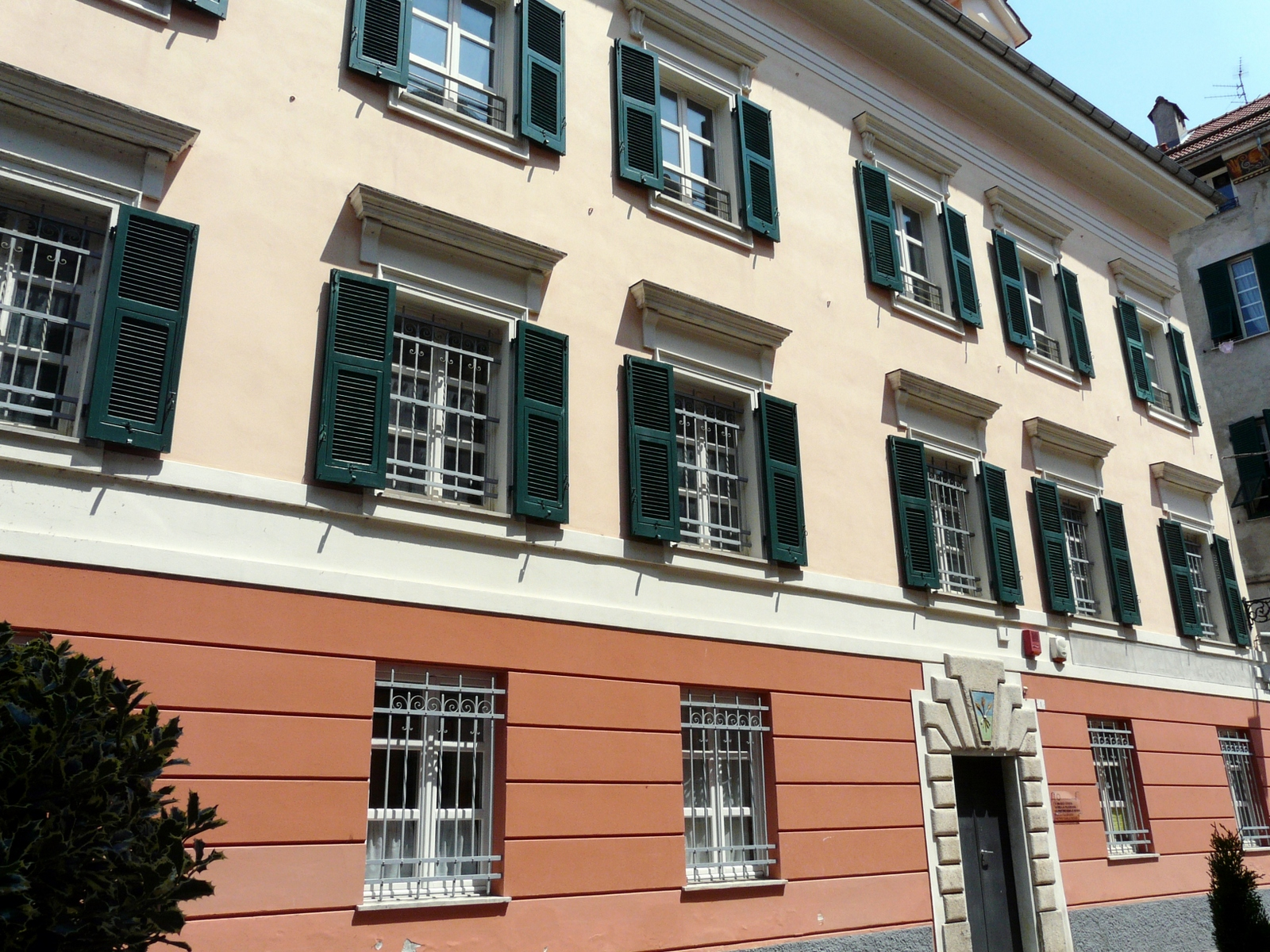 Museo civico della filigrana "Pietro Carlo Bosio", Campo Ligure, Liguria, Italia.